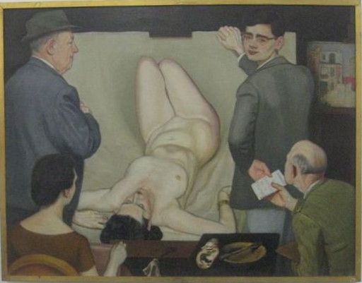 Cette composition met en abyme un grand tableau de Nu. C'est une démonstration de l'art de la peinture. Nu, portrait, nature morte et paysage y sont représentés.